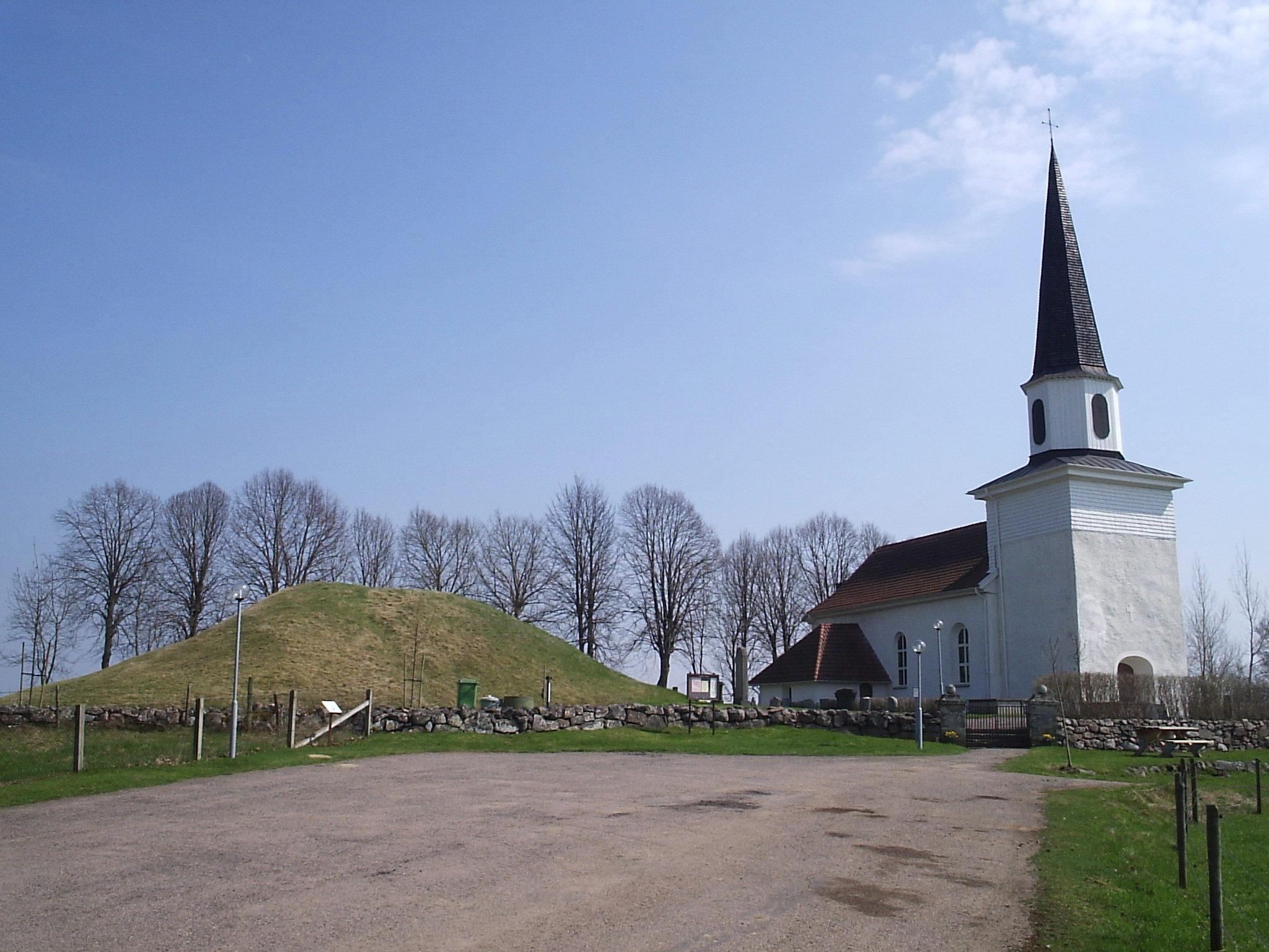 Flistads kyrka med storhögen Kung Ranes hög (RAÄ-nr Flistad 12:1) i Flistads socken, Vadsbo härad, Skövde kommun, f.d. Skaraborgs län, Västergötland, Västra Götalands län, Sverige. Bilden är fotograferad av Harri Blomberg.